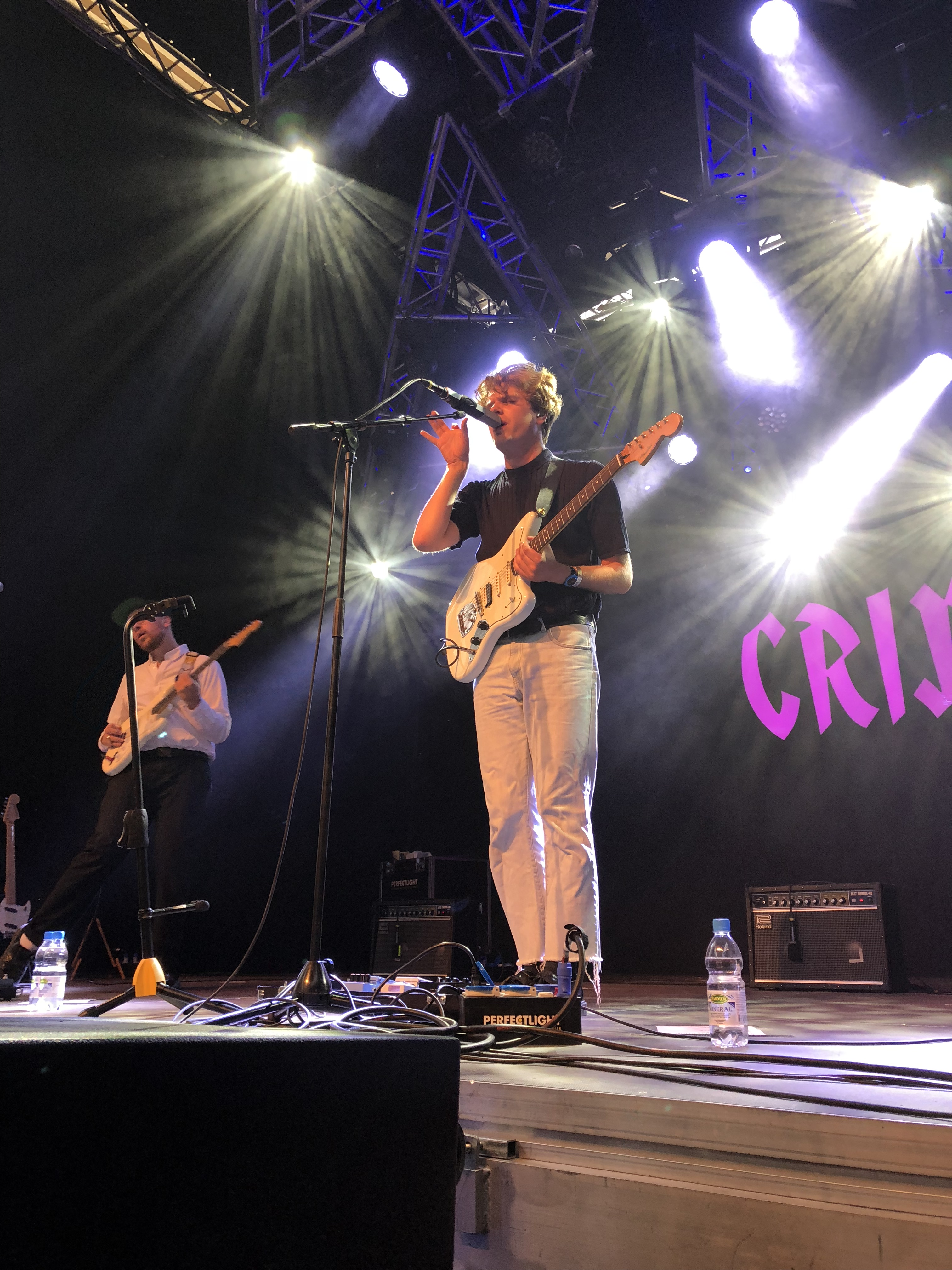 Konzert von Crimer an den Jazztagen Lichtensteig